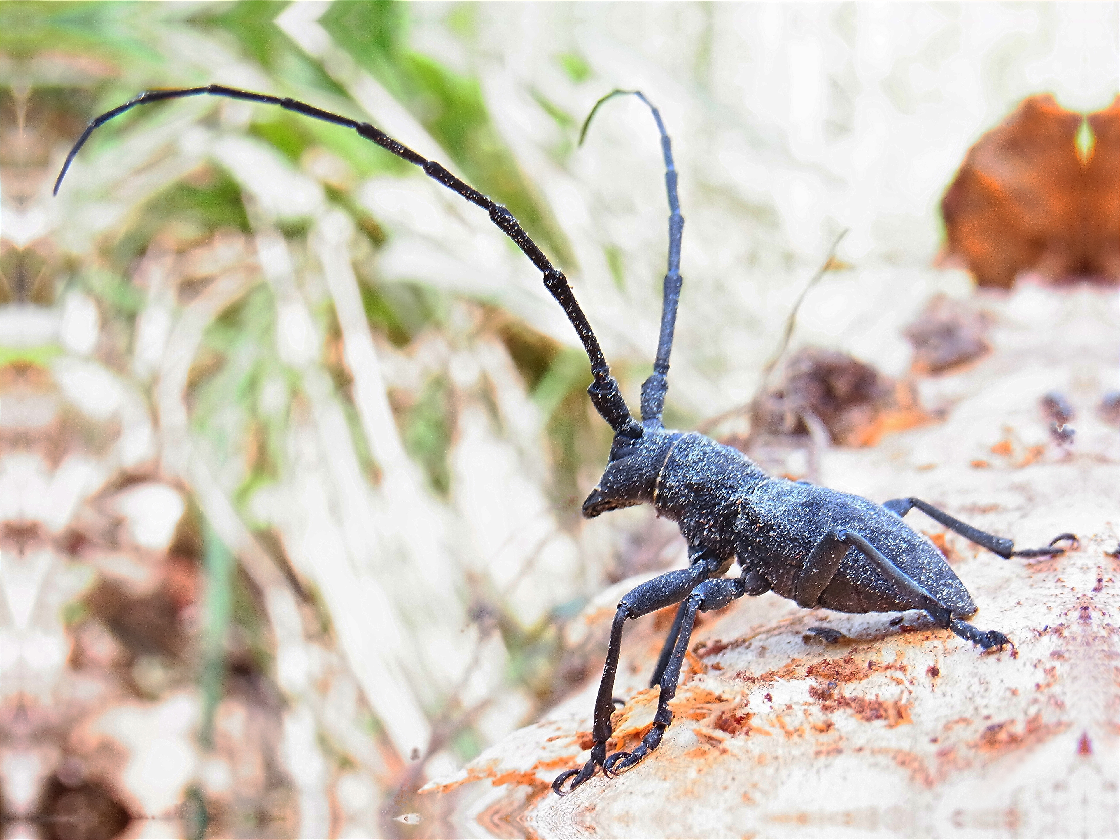 Morimus asper, Männchen, mit Pollen von Kiefern bestäubt, aus Frankreich am 24. April 2013